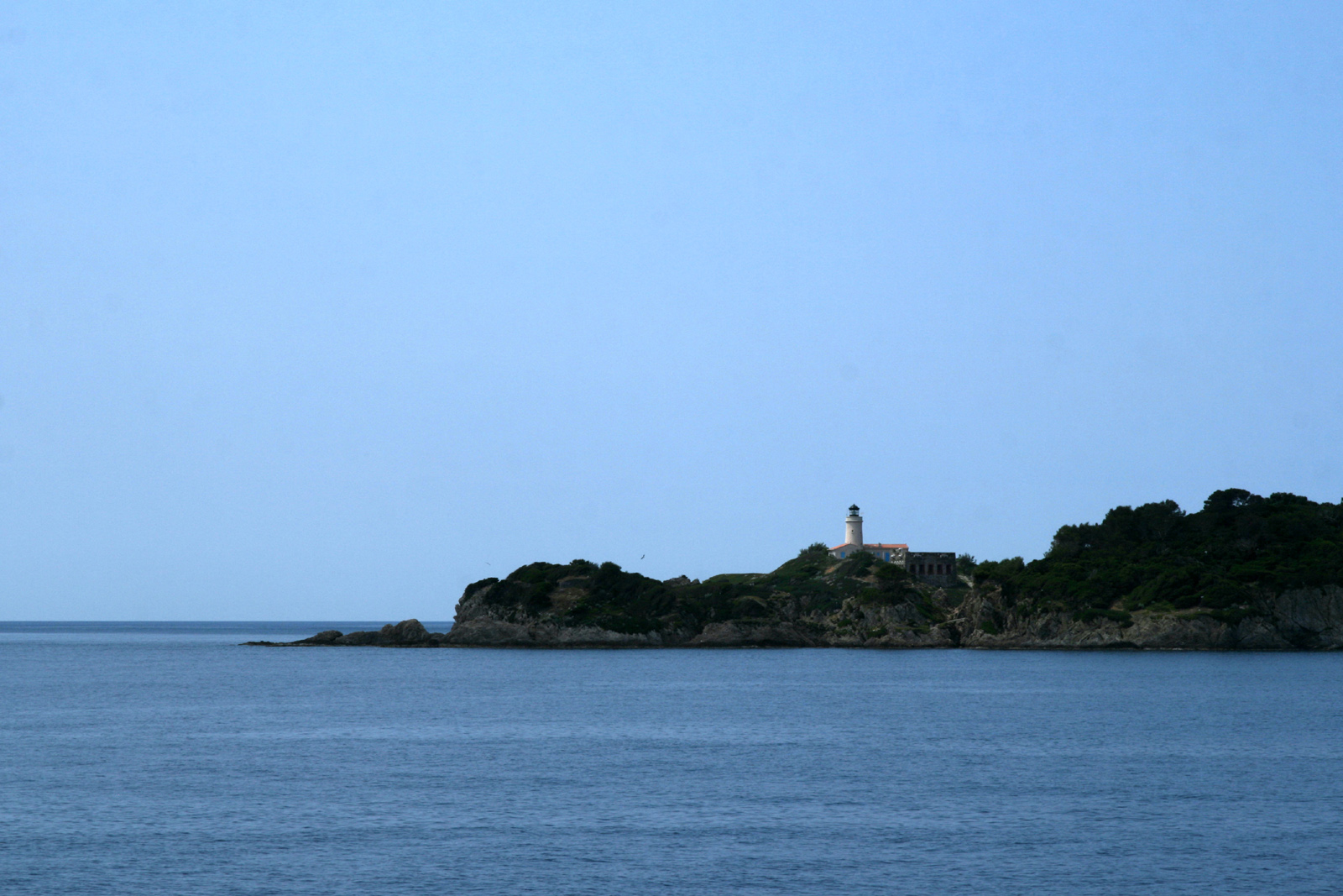 Phare de l'ile du Grand-Ribaud